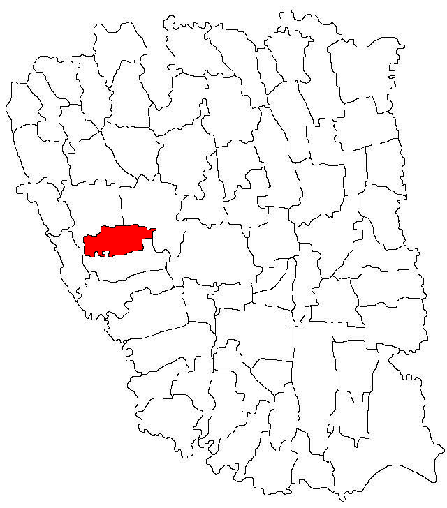 Categorie:Hărţi ale judeţului Galaţi